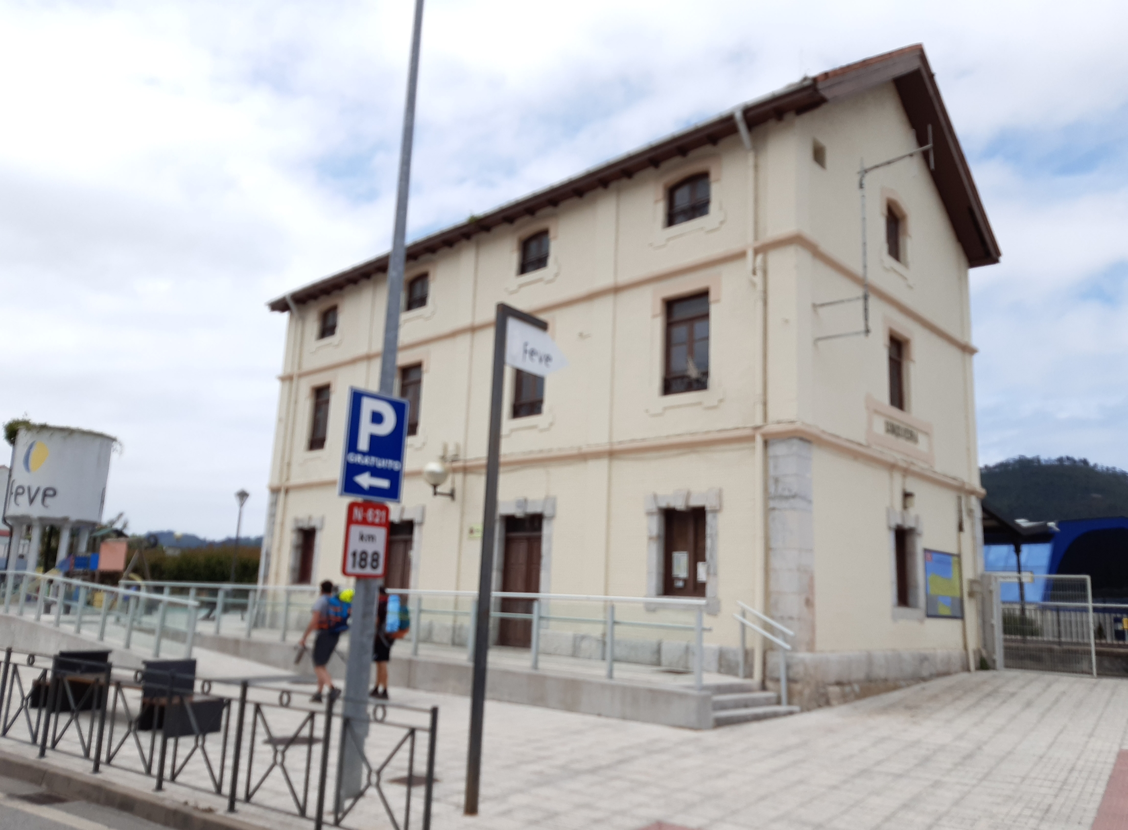 Edificio de viajeros de la estación de Unquera (Cantabria). A la izquierda se ve el antiguo depósito de agua para locomotoras a vapor.